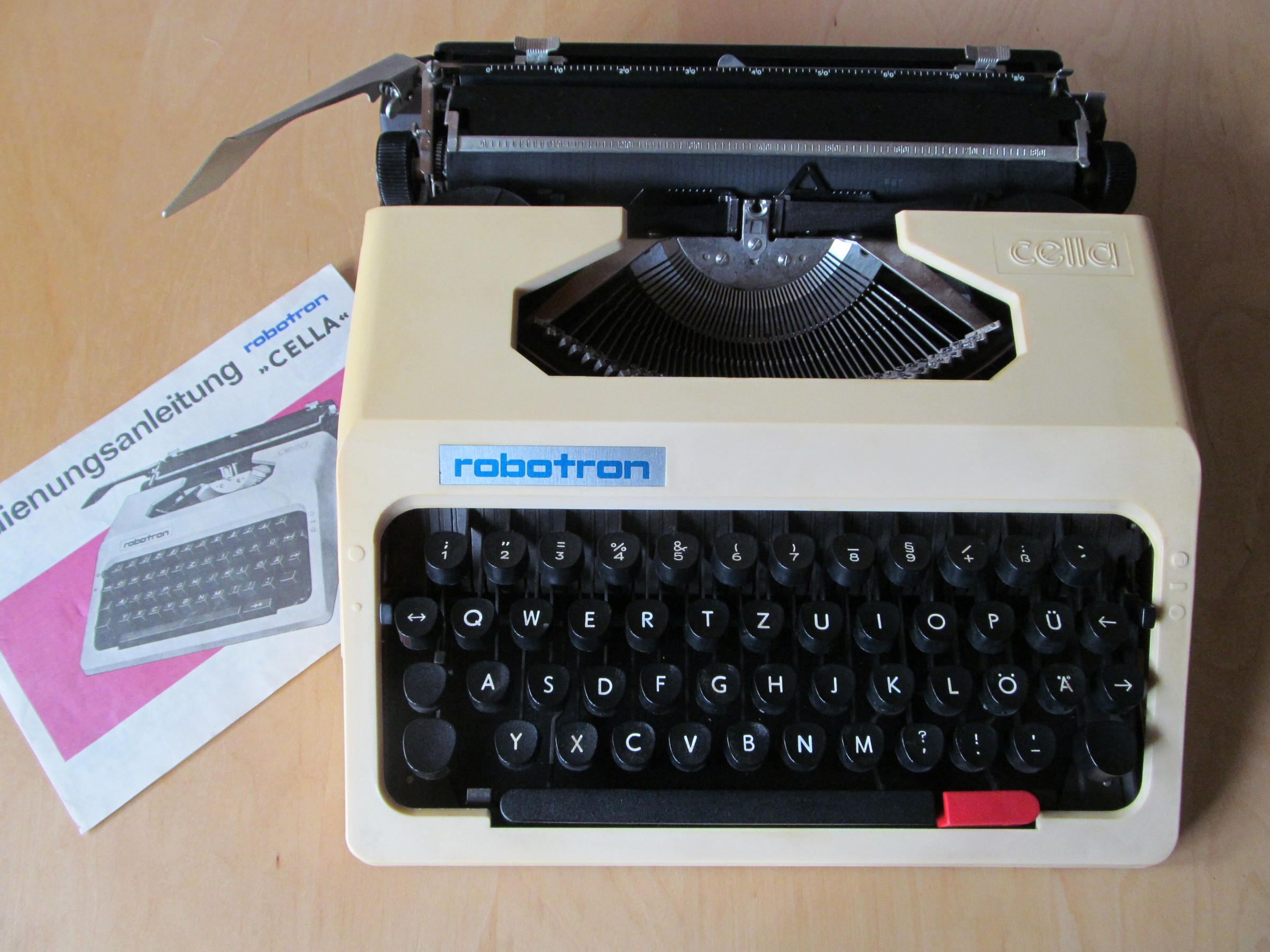 Flach-Schreibmaschine Robotron Cella aus dem VEB Robotron-Elektronik Zella-Mehlis, Baujahr 1987, Design: Karl Clauss Dietel (* 1934), Schrägansicht mit Bedienungsanleitung